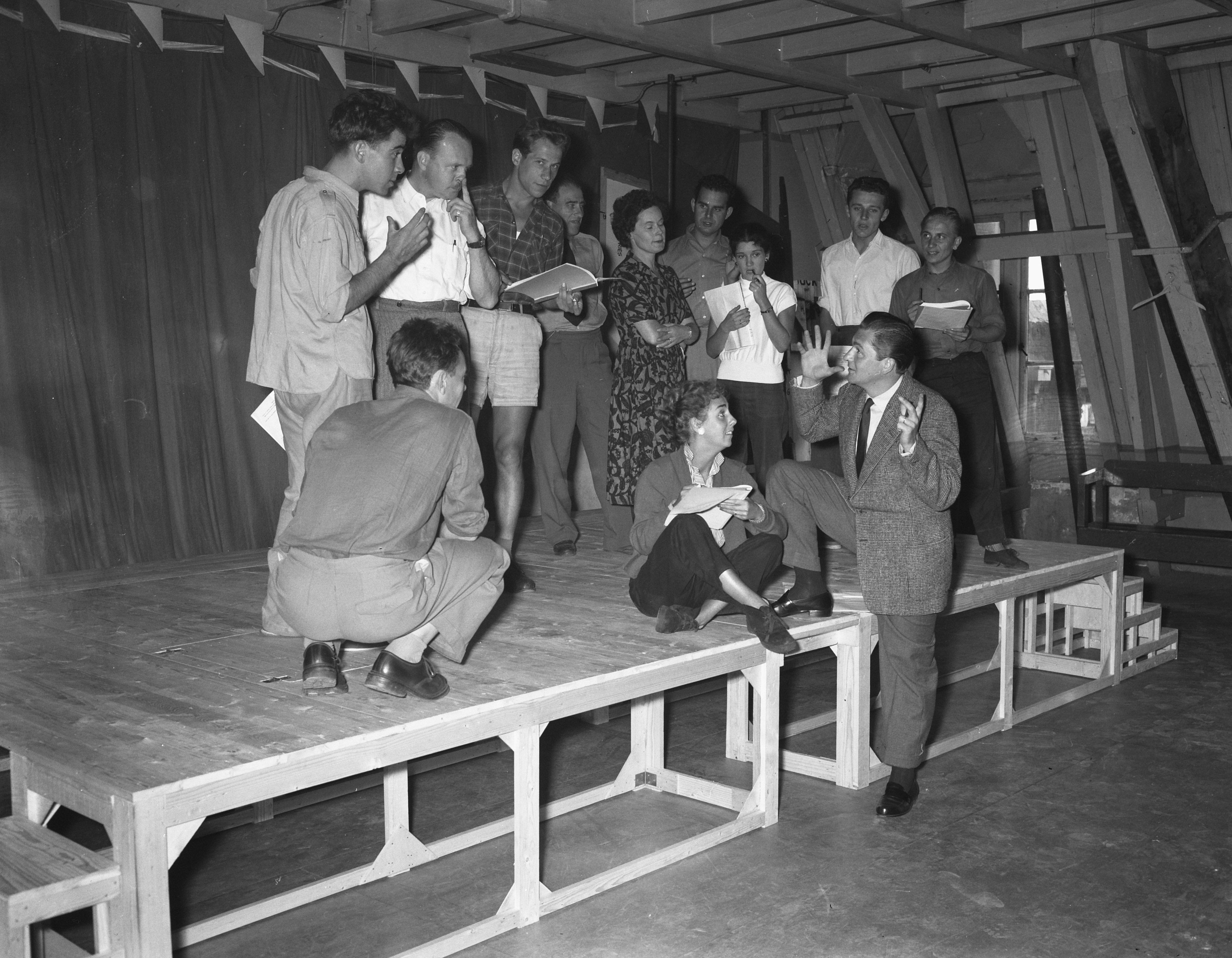 Collectie / Archief : Fotocollectie Anefo Reportage / Serie : [ onbekend ] Beschrijving : Regisseur Georges Vitaly regisseert Moliers blijspel Datum : 3 augustus 1955 Trefwoorden : Regisseurs, blijspelen Persoonsnaam : Georges Vitaly Fotograaf : Noske, J.D. / Anefo Auteursrechthebbende : Nationaal Archief Materiaalsoort : Negatief (zwart/wit) Nummer archiefinventaris : bekijk toegang 2.24.01.04 Bestanddeelnummer : 907-2635